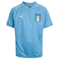 uniforme das copa das confederações